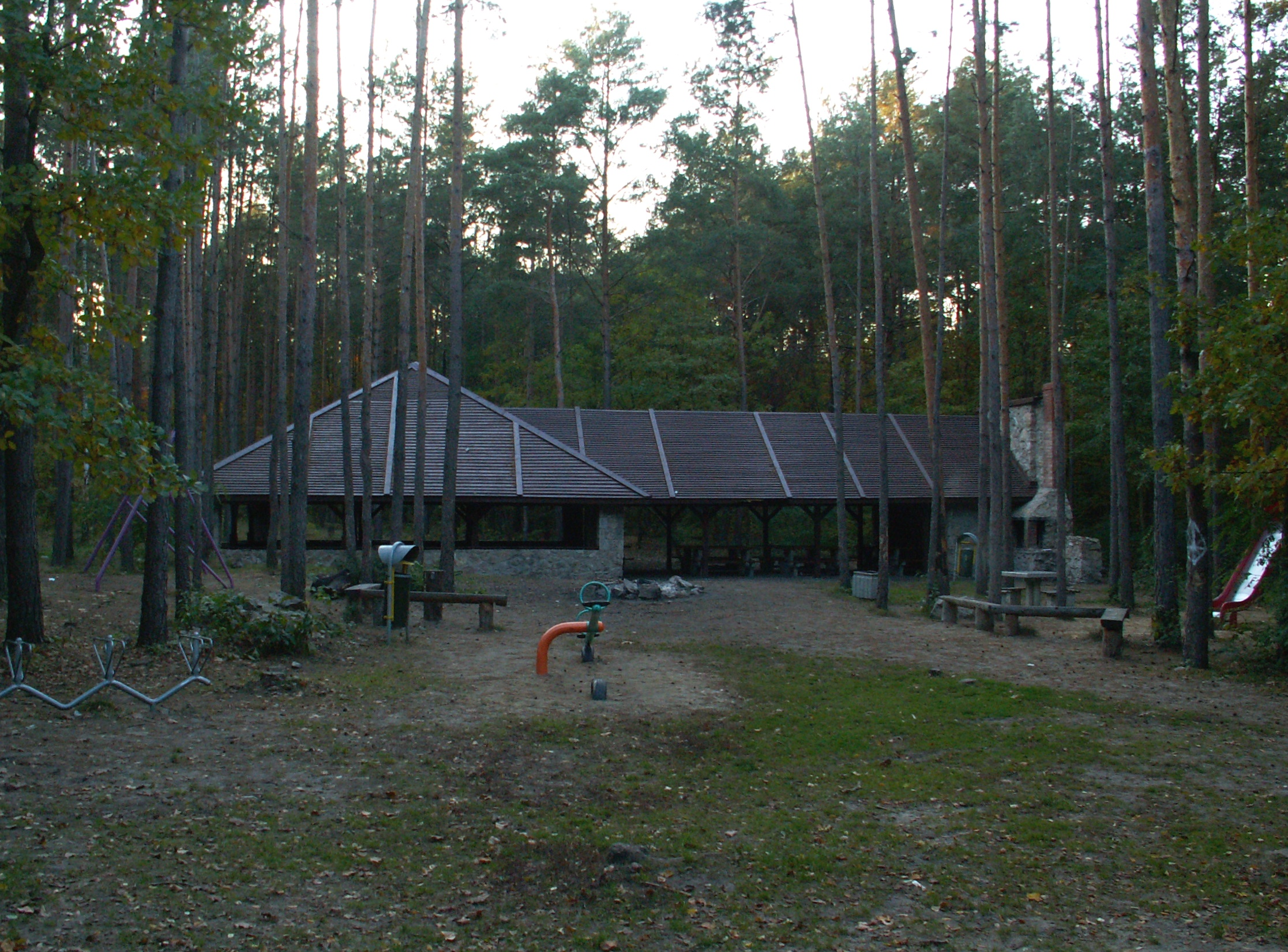 Stadion Leśny w Kielcach